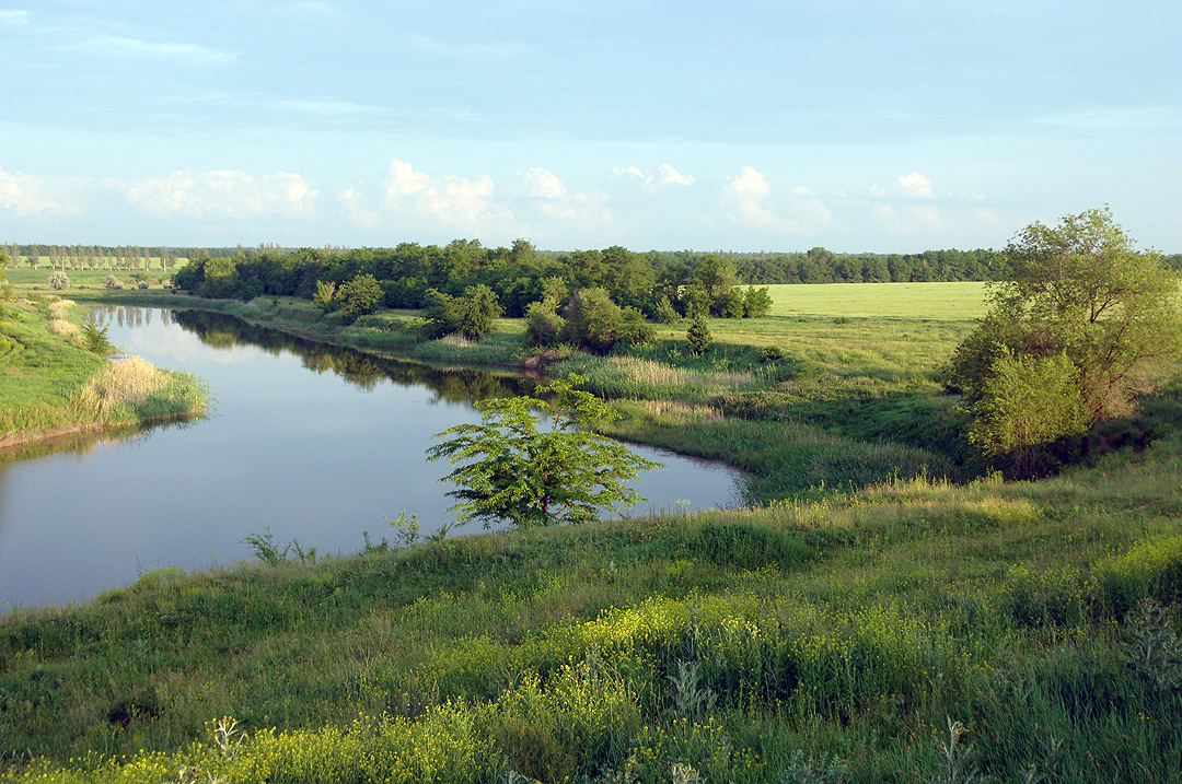 Река Терса